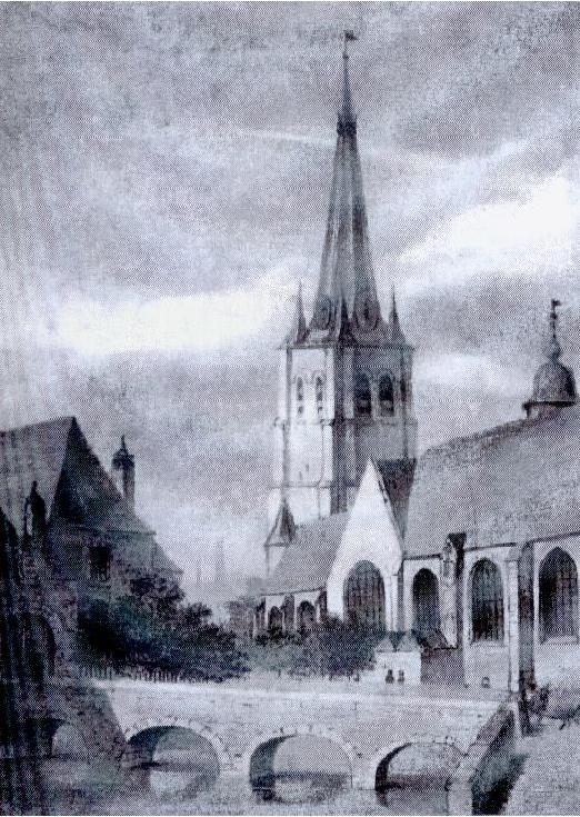 Eglise Saint-Christophe et Château du Bailly à Tourcoing (lithographie du début du dix-neuvième siècle).